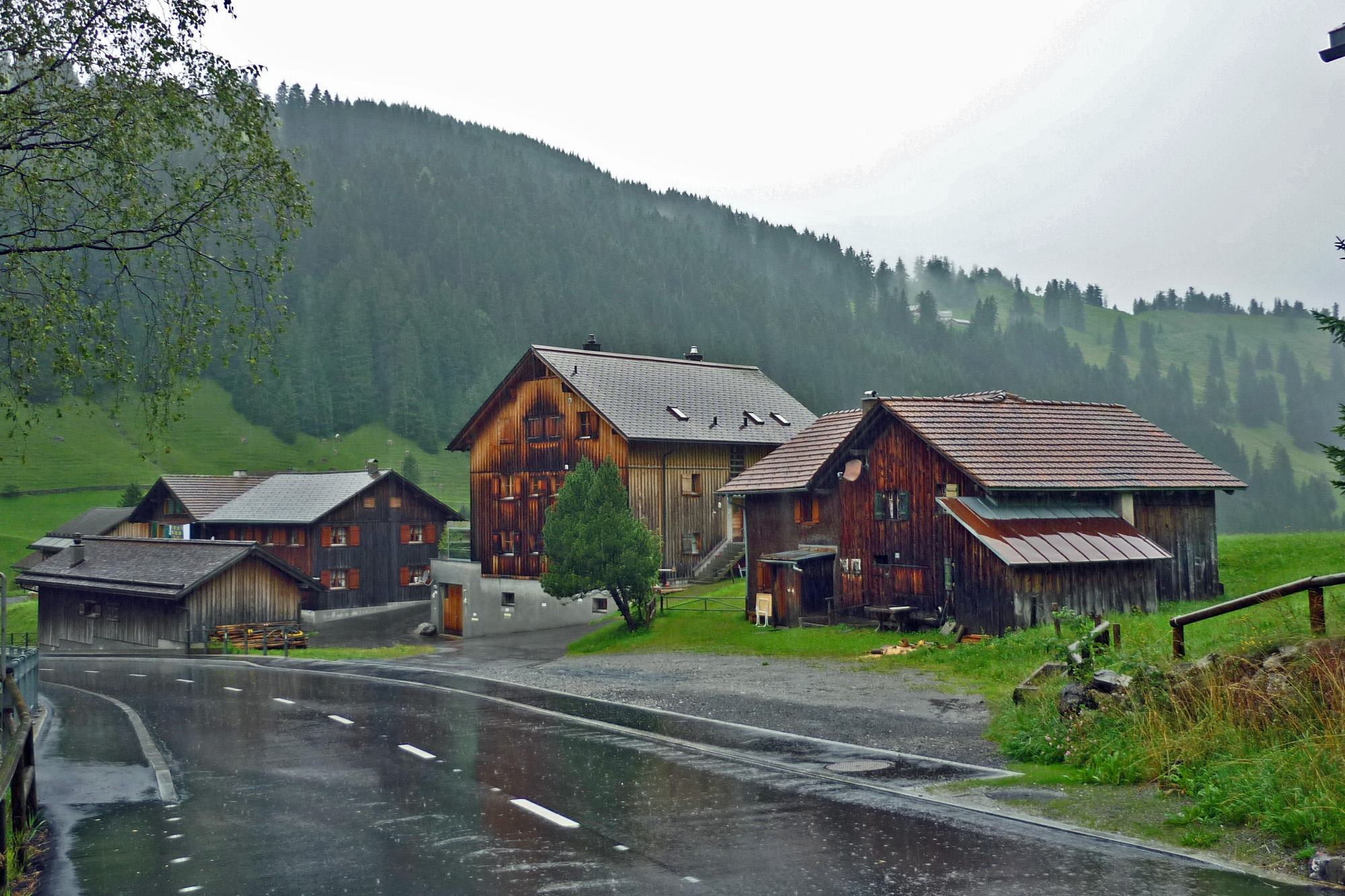 Häuser im Ort Steg (Liechtenstein)